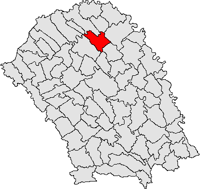 Categorie:Hărţi ale judeţului Botoşani